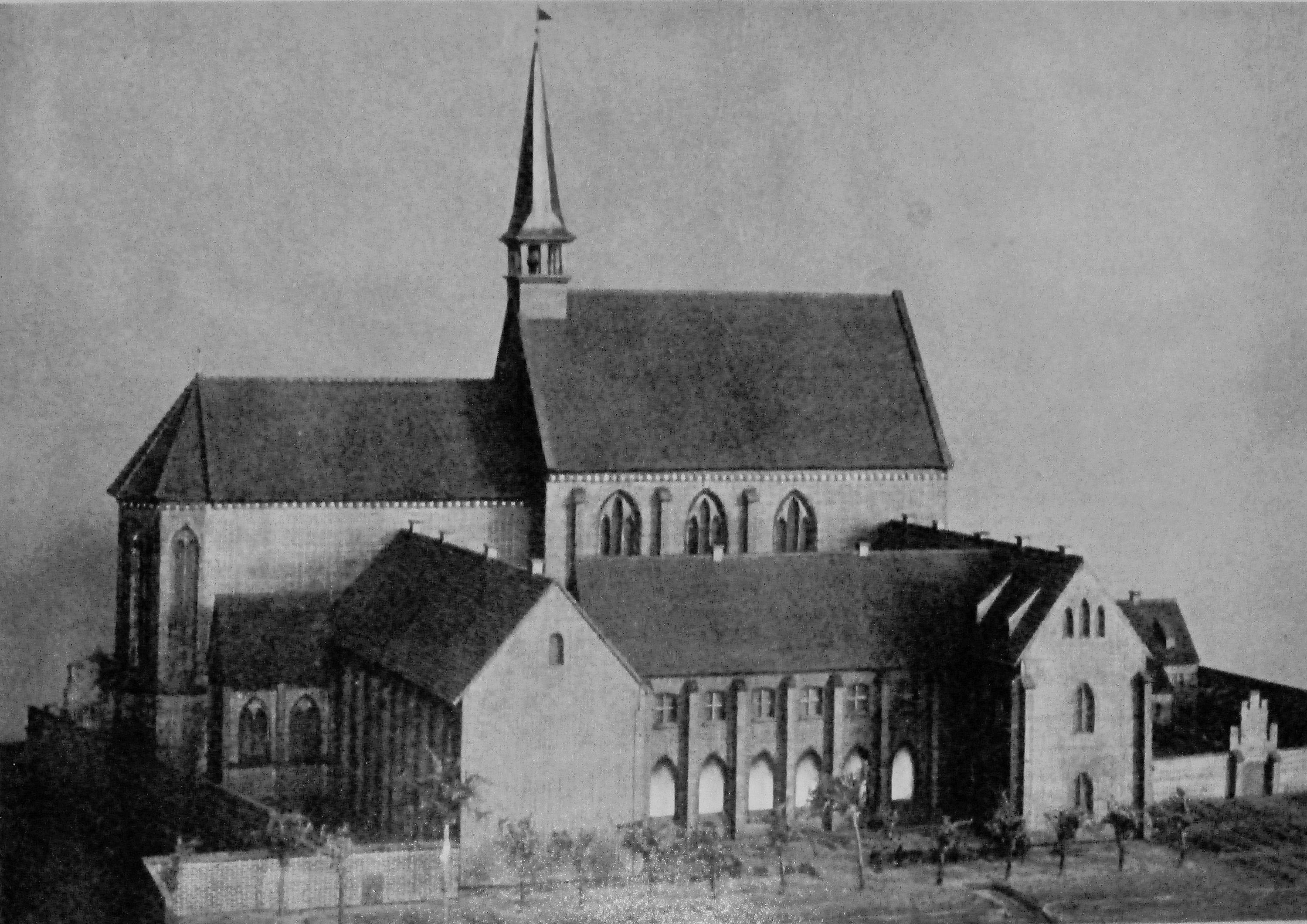 Katharinenkloster Rostock (Franziskaner), Rekonstruktion in der Hochschule für Musik und Theater Rostock